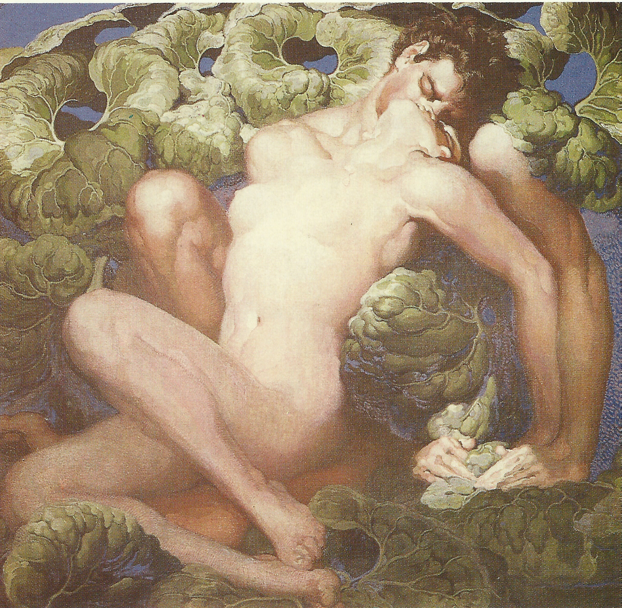 32. Poema de la Tierra / Capas de la Reina, 1934-1938, óleo sobre lienzo, 126 x 126 cm. (Museo Néstor).